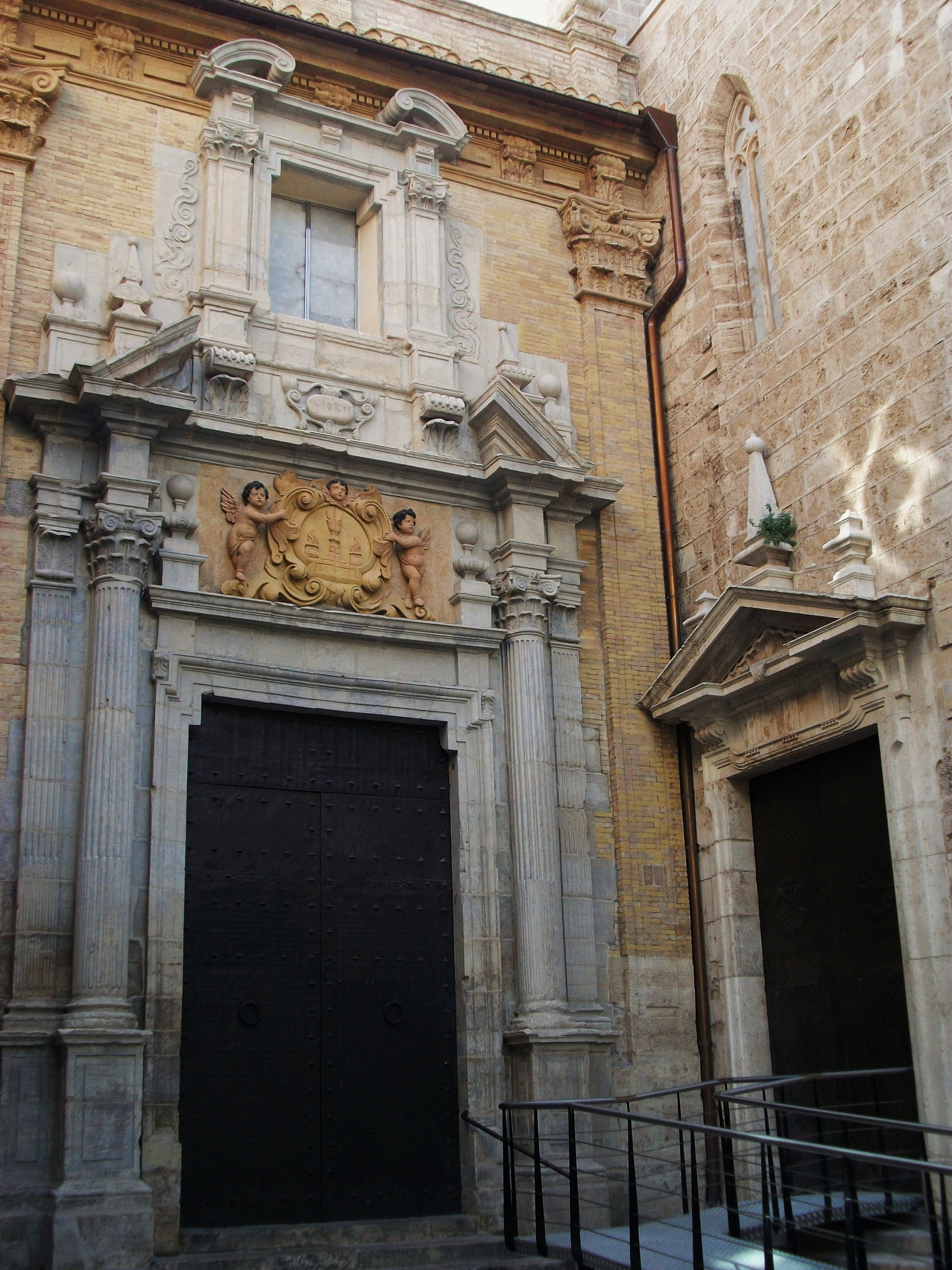 Portada de la capella de la Comunió i lateral de l'església de sant Martí de València.